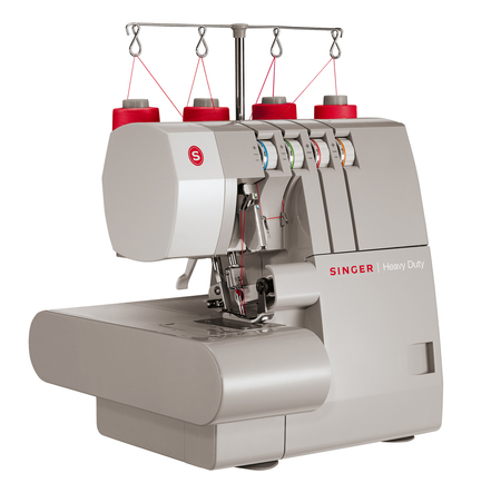 Kiswahili: kola Singer heavy duty